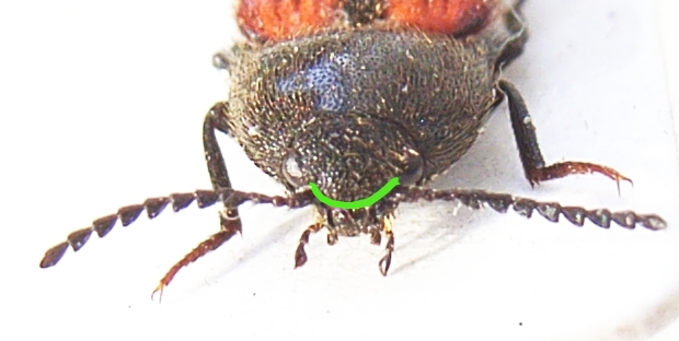 Front of Ampedus sanguinolentus, Stirnleiste grün nachgezogen